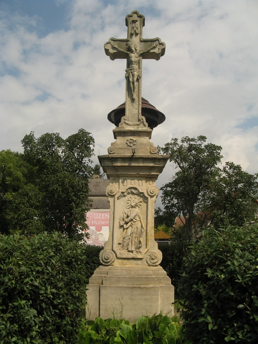 Krucifix, Bylany (okres Chrudim).